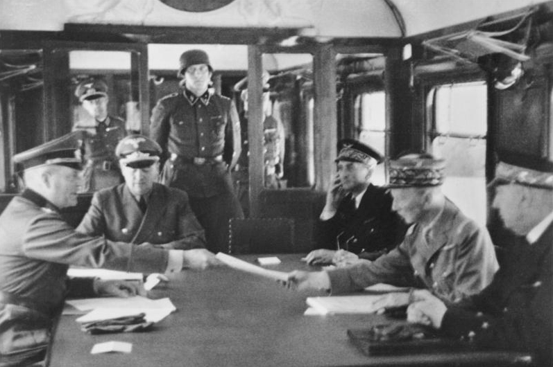 Compiegne 1940, Generaloberst Keitel überreicht die Waffenstillstandsbedingungen Information added by Wikimedia users.